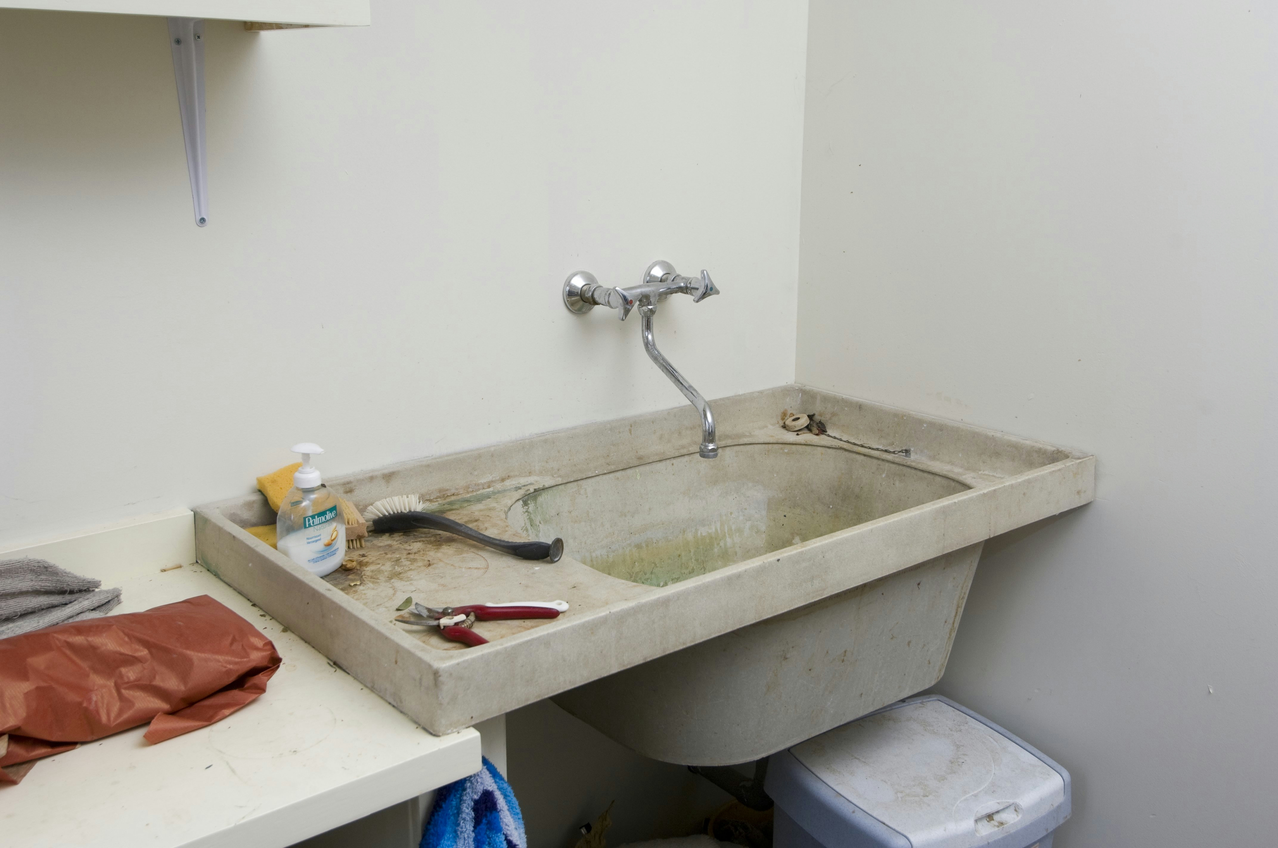 Nederlands Hervormde kerk, pastorie: Interieur, lavet in bijkeuken